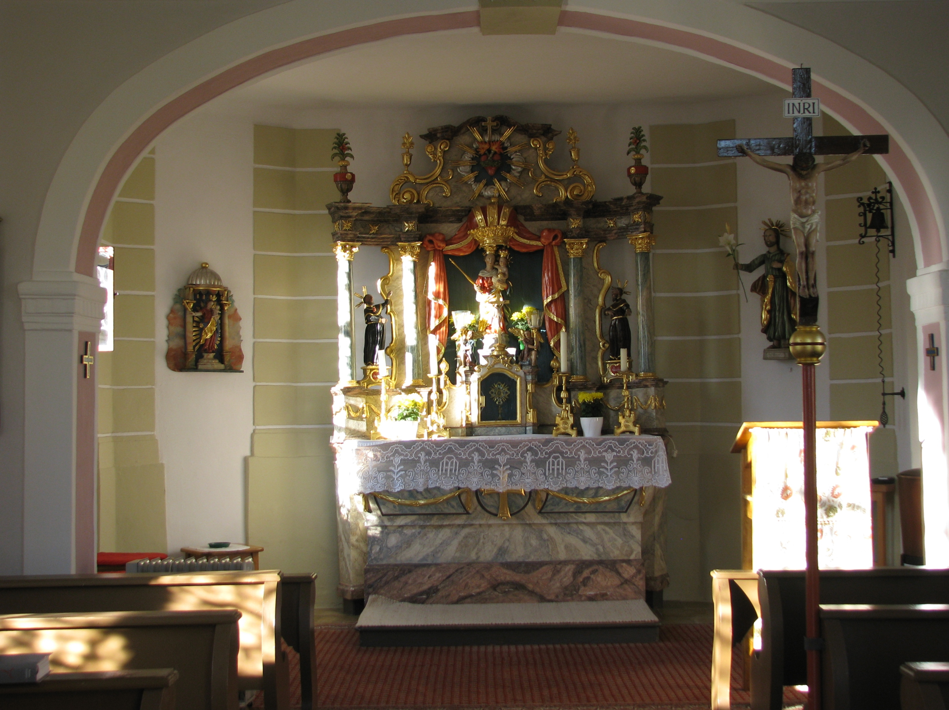 Pierheim, Ortsteil von Hilpoltstein im mittelfränkischen Landkreis Roth in Bayern, Marienkapelle von 1820/21